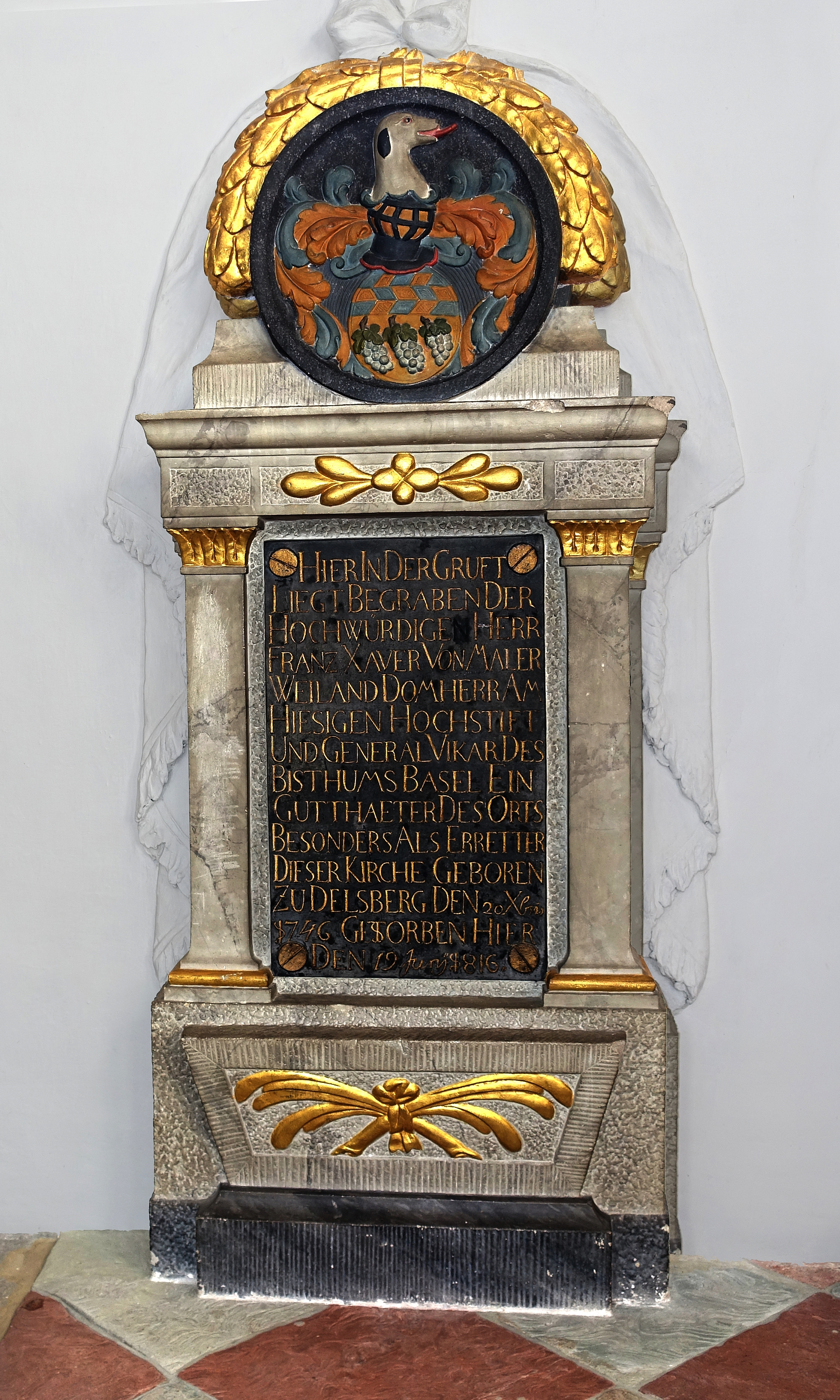 Grabinschrift von Franz Xaver von Maler (1746–1816) im Dom von Arlesheim. Er bewahrte 1811 durch Kauf die Domkirche von Arlesheim vor dem Zerfall. 1786 Domherr von Basel (päpstl. Provision), Nach 1801 von Arlesheim aus Verwaltung der Pfarreien der Diözese im Kt. Solothurn und im Fricktal.